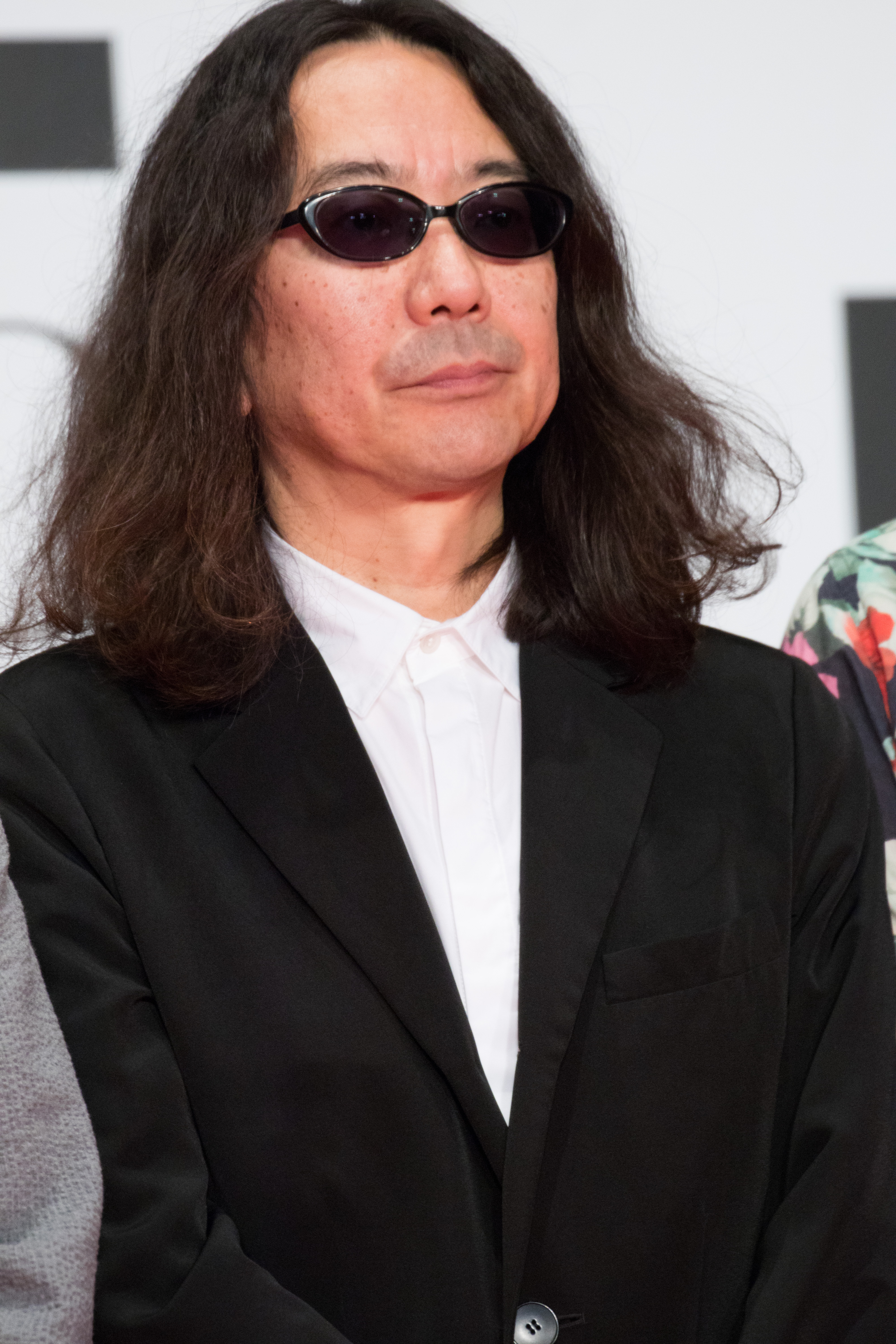 第29回 東京国際映画祭 オープニングセレモニー みうらじゅん (変態だ)